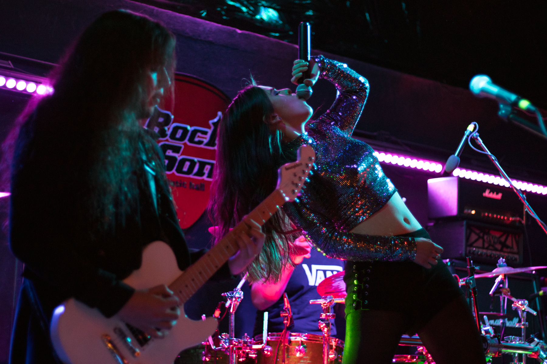 Kate Michaels y Joe Saraf en vivo en Rock Son Satélite.